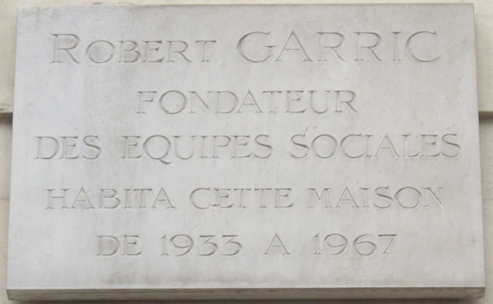 Plaque commémorative, 28 avenue Bosquet, Paris 7e. « Robert Garric, fondateur des Équipes sociales, habita cette maison de 1933 à 1967. »